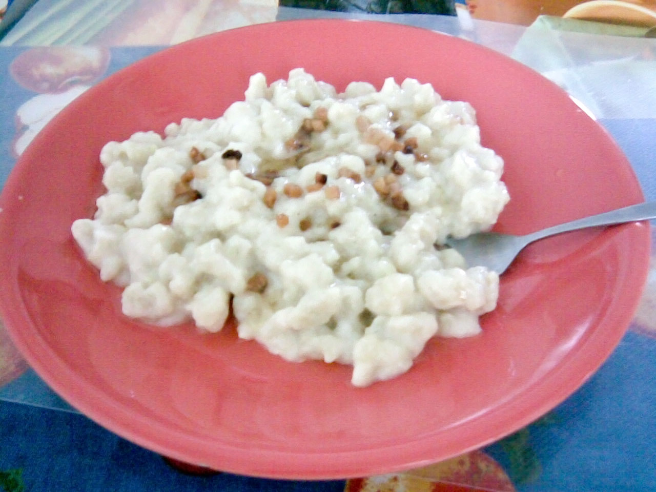 Bryndzové halušky